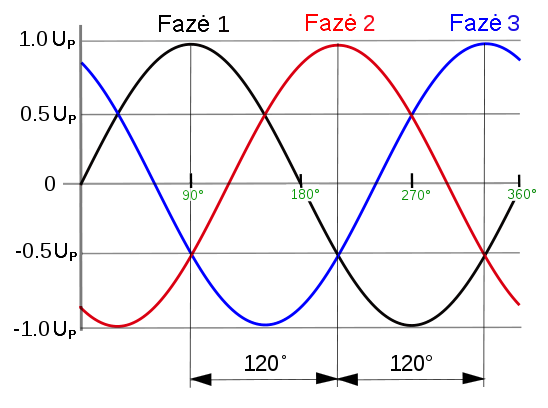 Trifazės Elektros grafikas Autoriai: SiriusA pirma padare failą File:3-fas-spänningar.svg, įkeltą rugpiucio 10 d. 2007 m. J JMesserly pakeite tą failą 2008-12-30 į File:3 phase AC waveform.svg. H Padleckas tada pakeite šį failą gegužės 25 d. 2009 m. į ":Vaizdas:Trifazė Elektra.png".